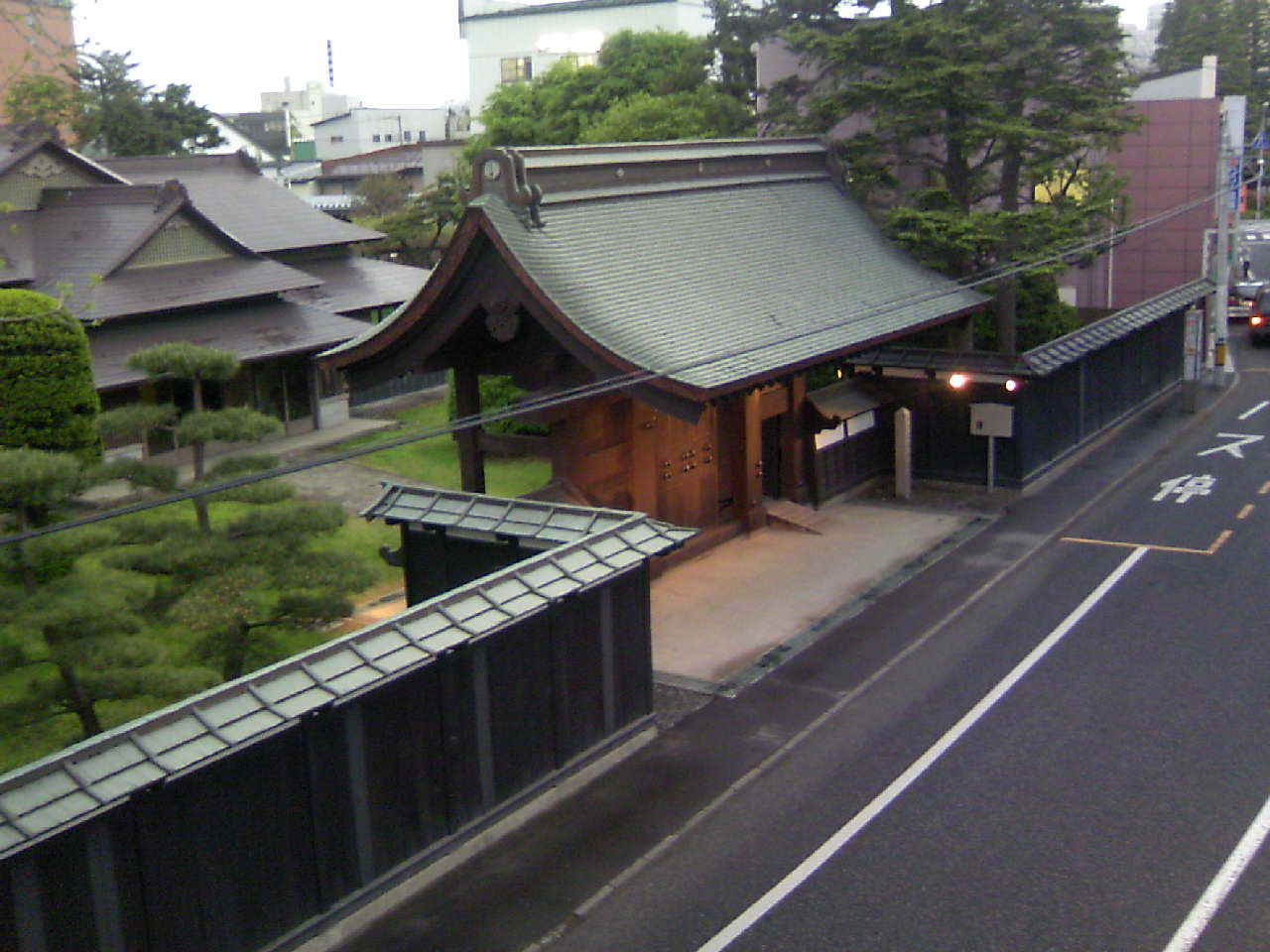 八戸城・角御殿表門／南部会館・入口（八戸市内丸） (UCHIMARU, HACHINOHE, AOMORI, JAPAN)